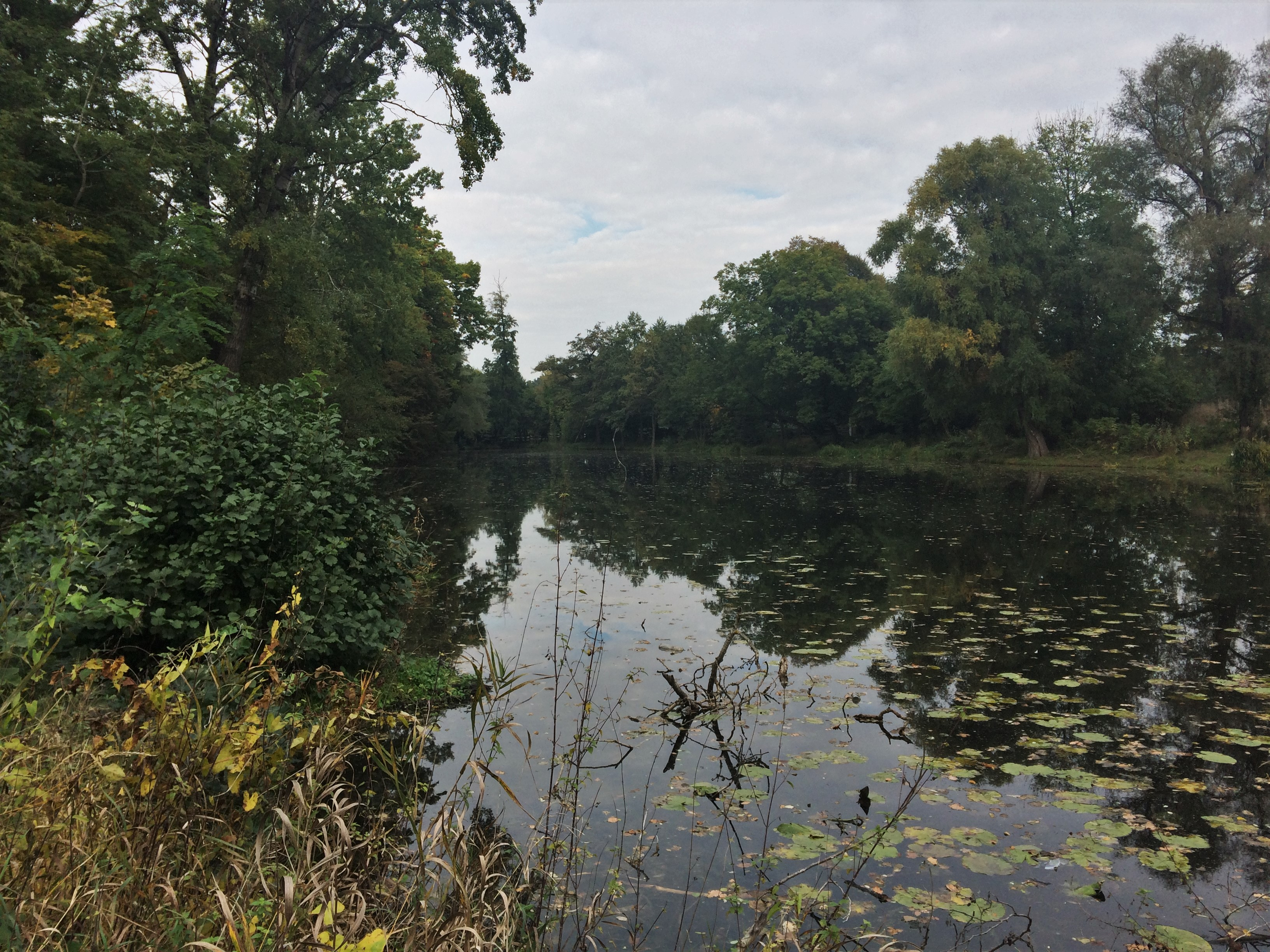 Tůň nacházející se severně od PP Hluchov